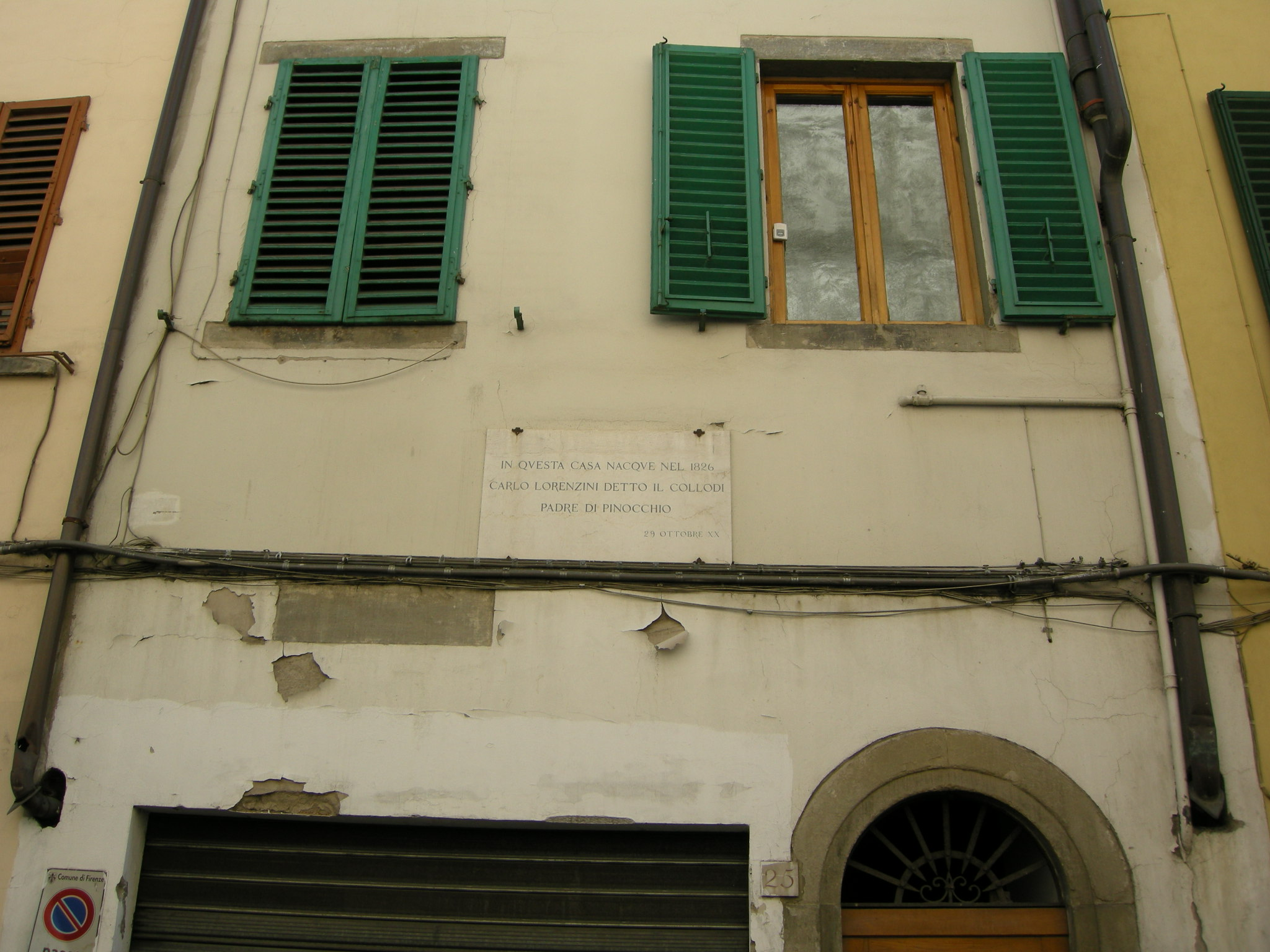 Via taddea, lapide a carlo lorenzini